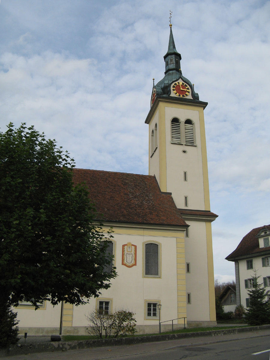 Katholische Kirche Sarmenstorf, Kanton Aargau, Schweiz